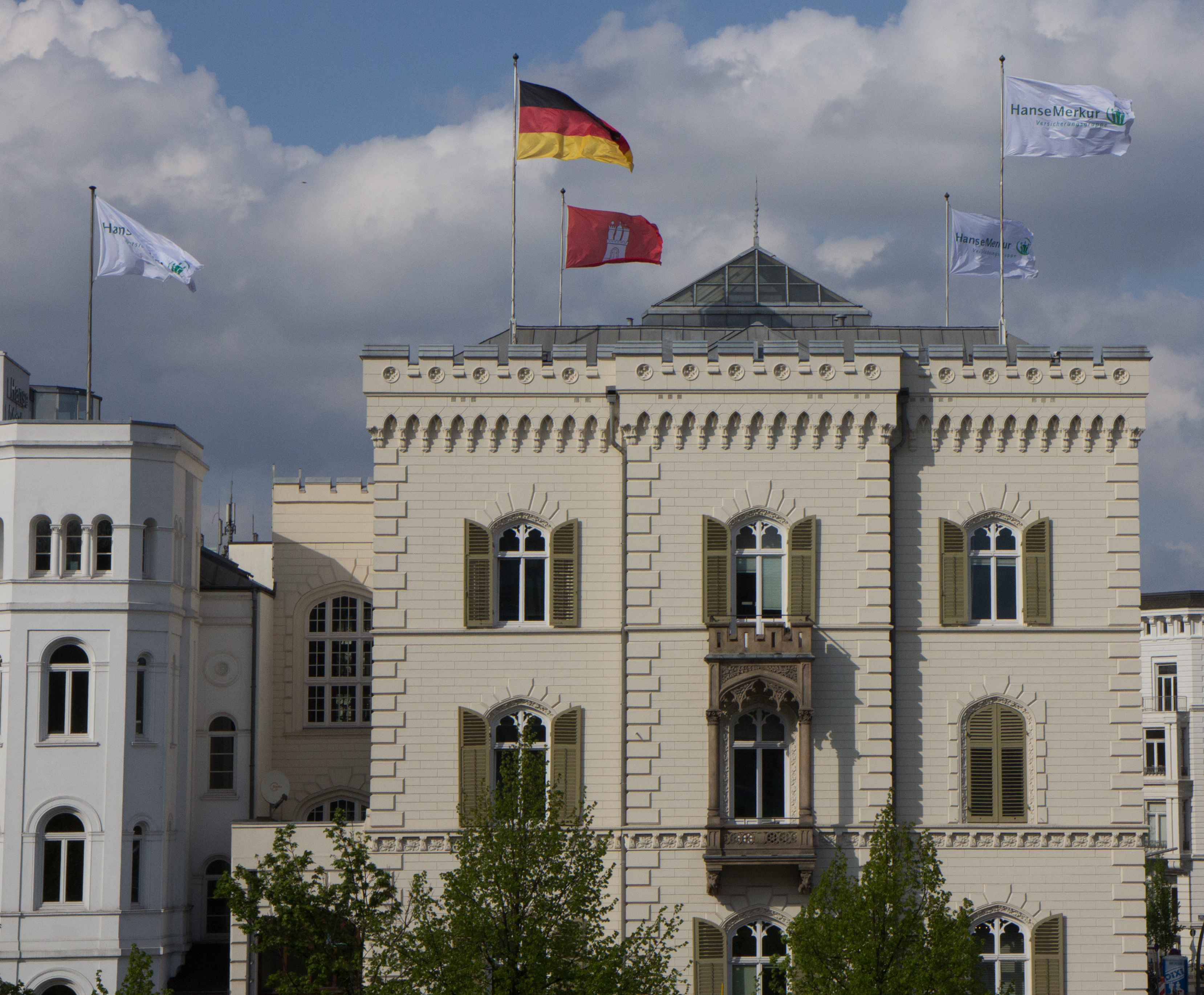 Zentrale der HanseMerkur Versicherungsgruppe in Hamburg.